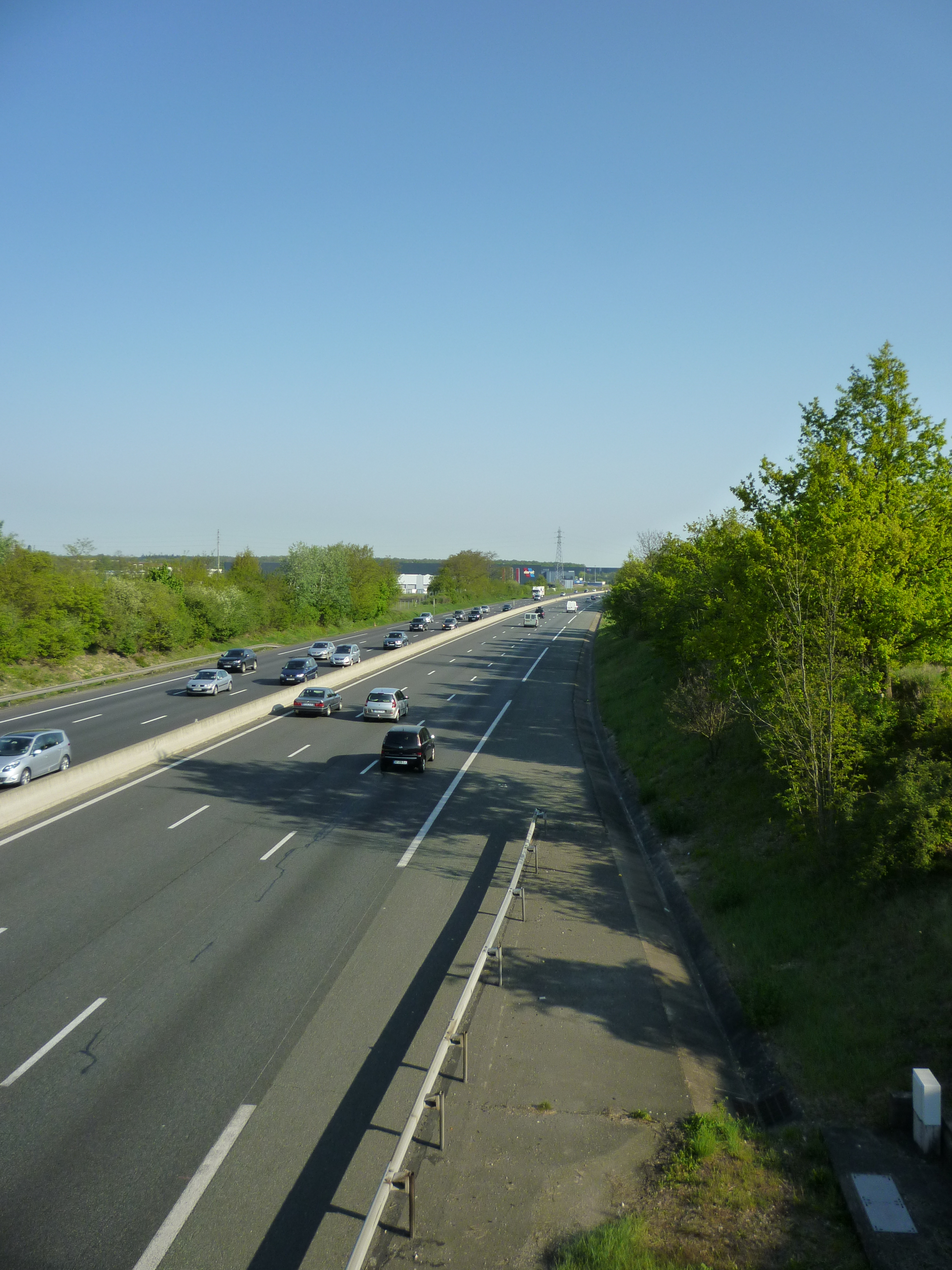 Photo prise du pont de la rue de la Fassière